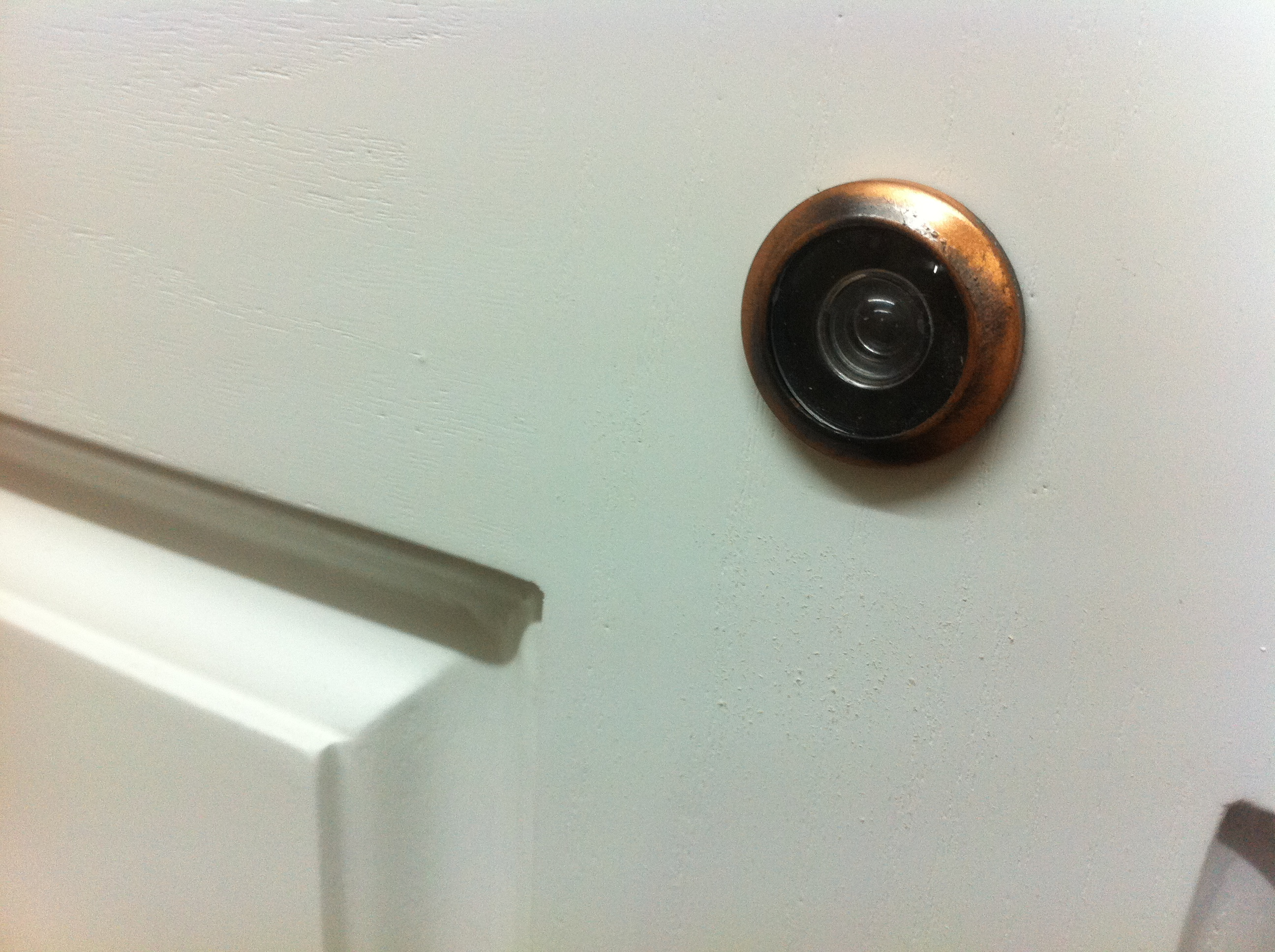 中文（香港）: 門觀景洞